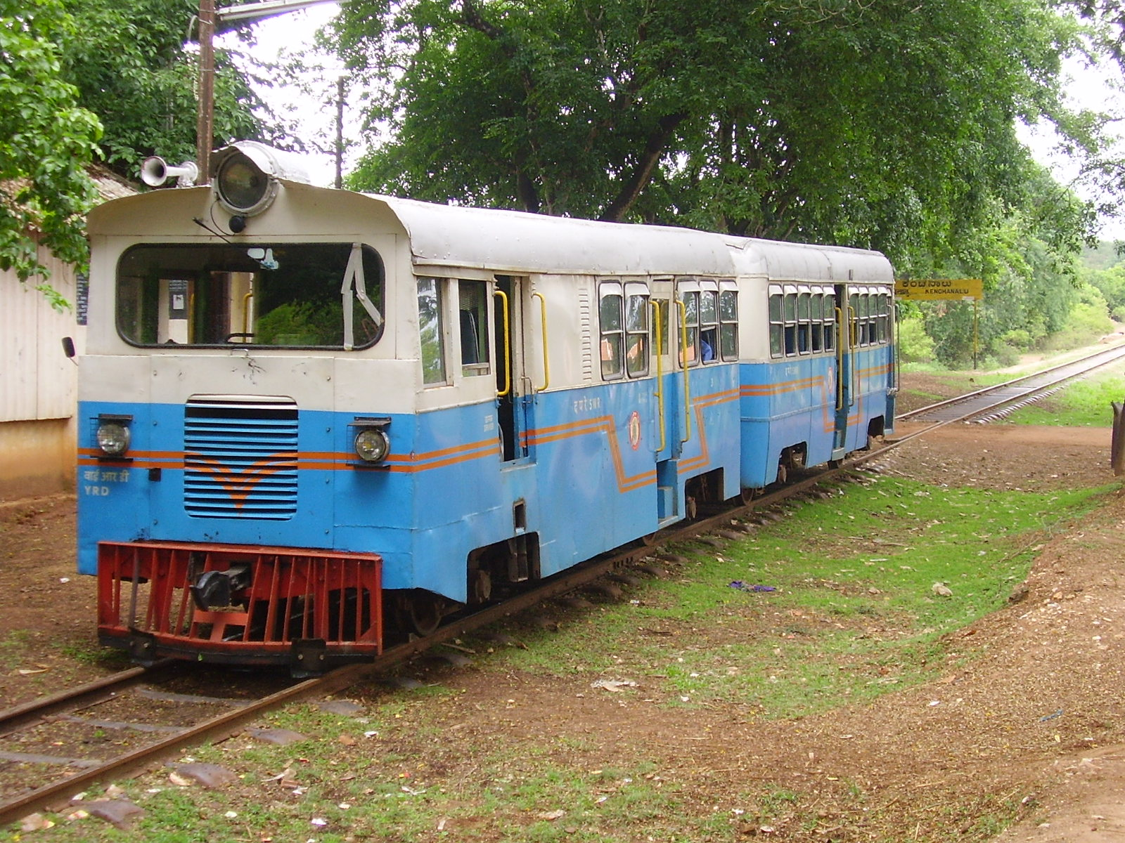 Toy Train btn Shimoga and Talagaopa